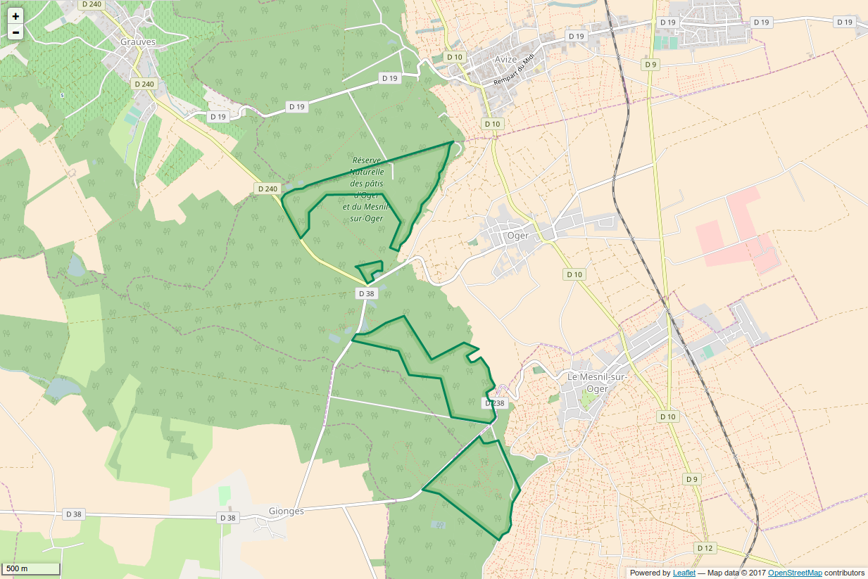 Périmètre de la RNN des patis d'Oger et du Mesnil sur Oger.